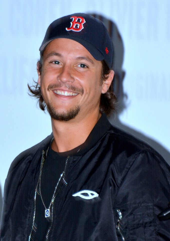 Nekfeu à l'avant-première du film "Tout nous sépare"